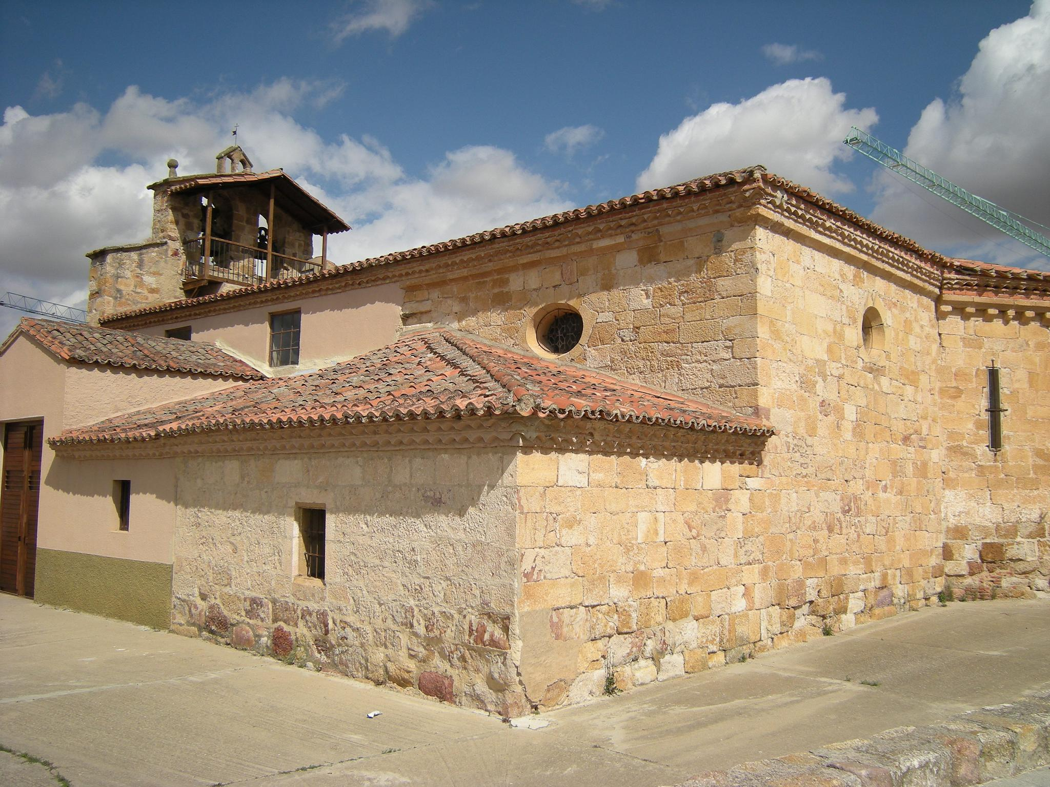 Iglesia de San Frontis de Zamora